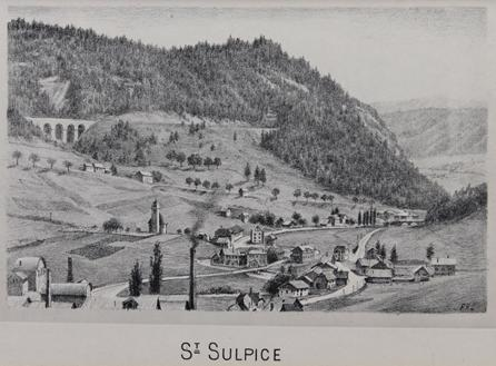 Saint-Sulpice, ligne ferroviaire Franco-Suisse Technique: Lithographie